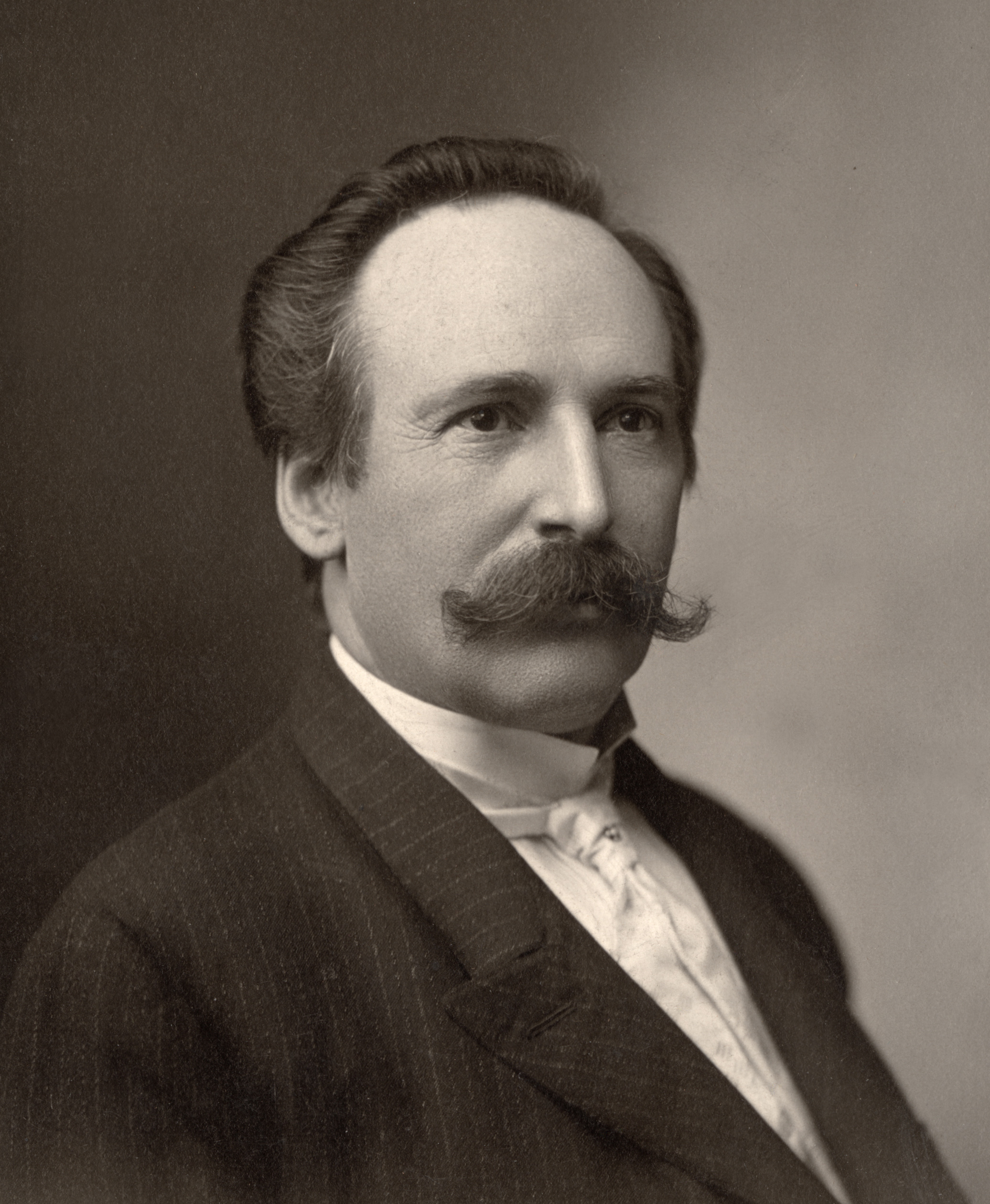 The image of German conductor Johann Friedrich Ludwig “Fritz” Scheel (1852-1907)Das foto von deutscher Dirigent Johann Friedrich (Fritz) Ludwig Scheel (1852-1907)